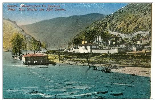 Манастирът "Свети Димитър" във Велес през Първата световна война